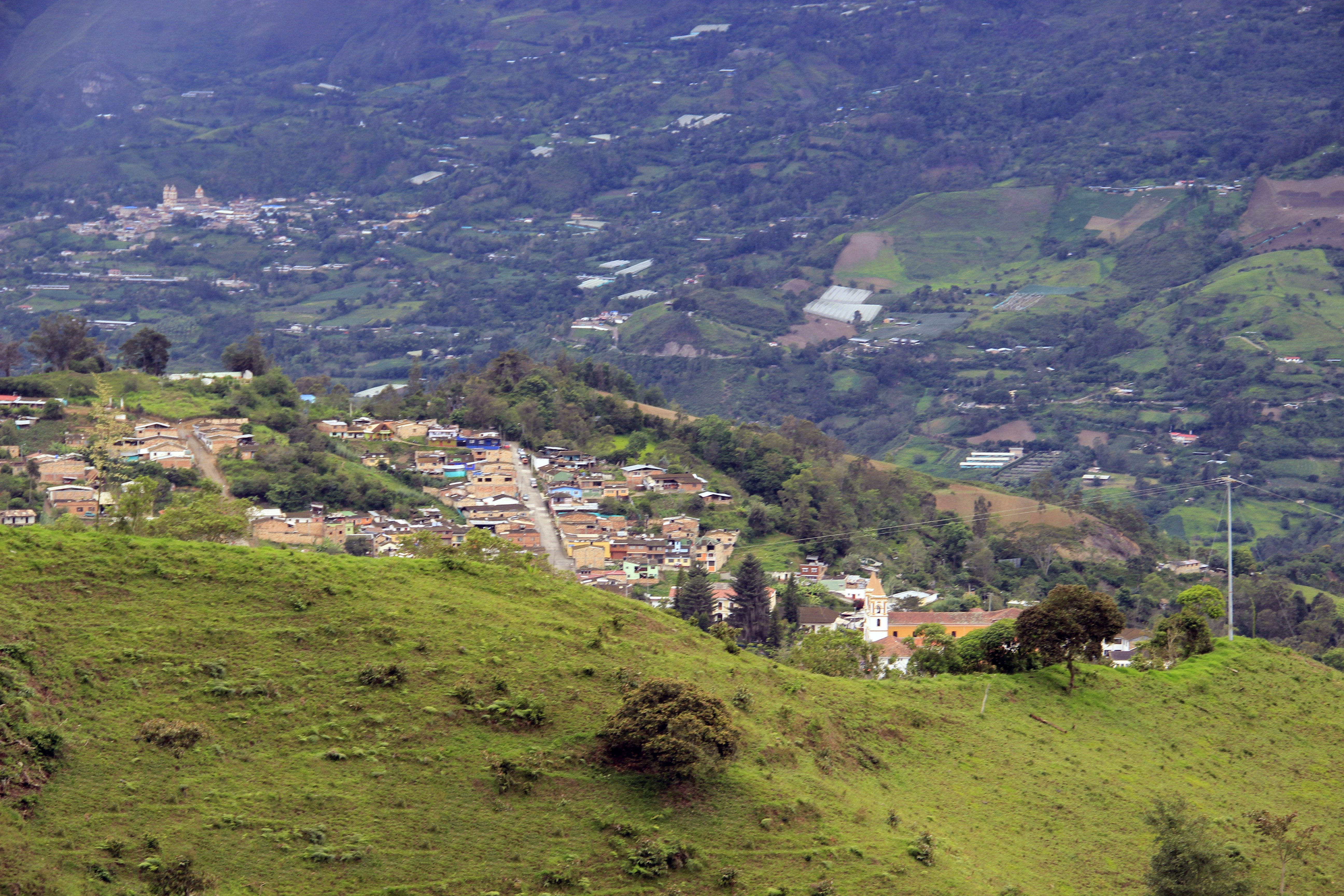 Casco Urbano del municipio de Fómeque